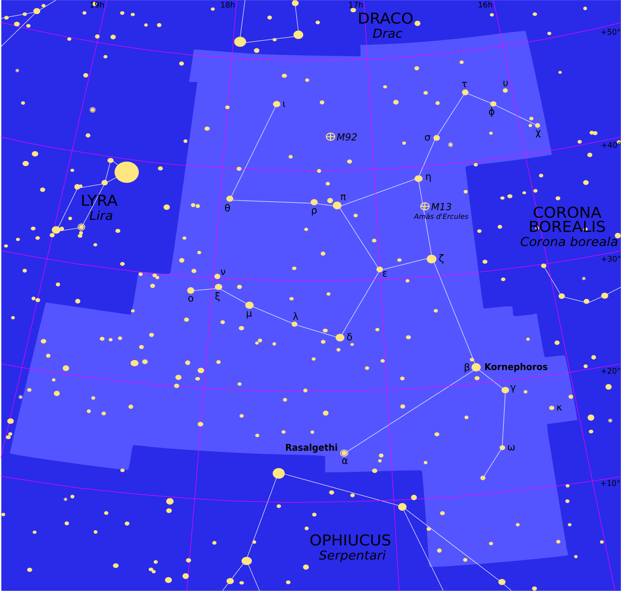 Representacion de la constellacion d'Ercules.